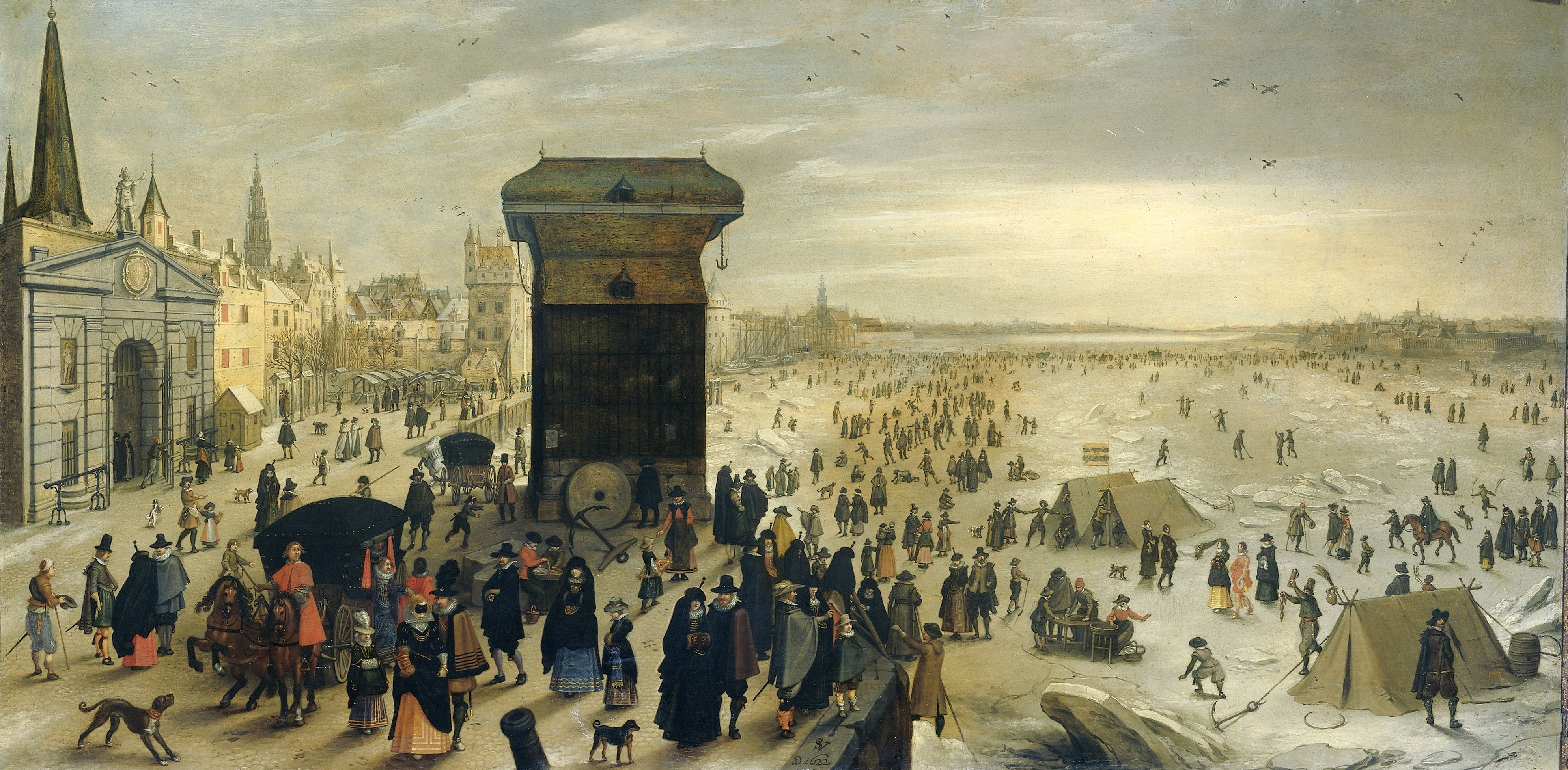 Gezicht op het ijsvermaak op de bevroren Schelde bij het Kranenhoofd te Antwerpen. Op het ijs vele schaatsers en kolfspelers, aan de rand van het ijs staan enkele tenten. Over de kade lopen veel mensen.